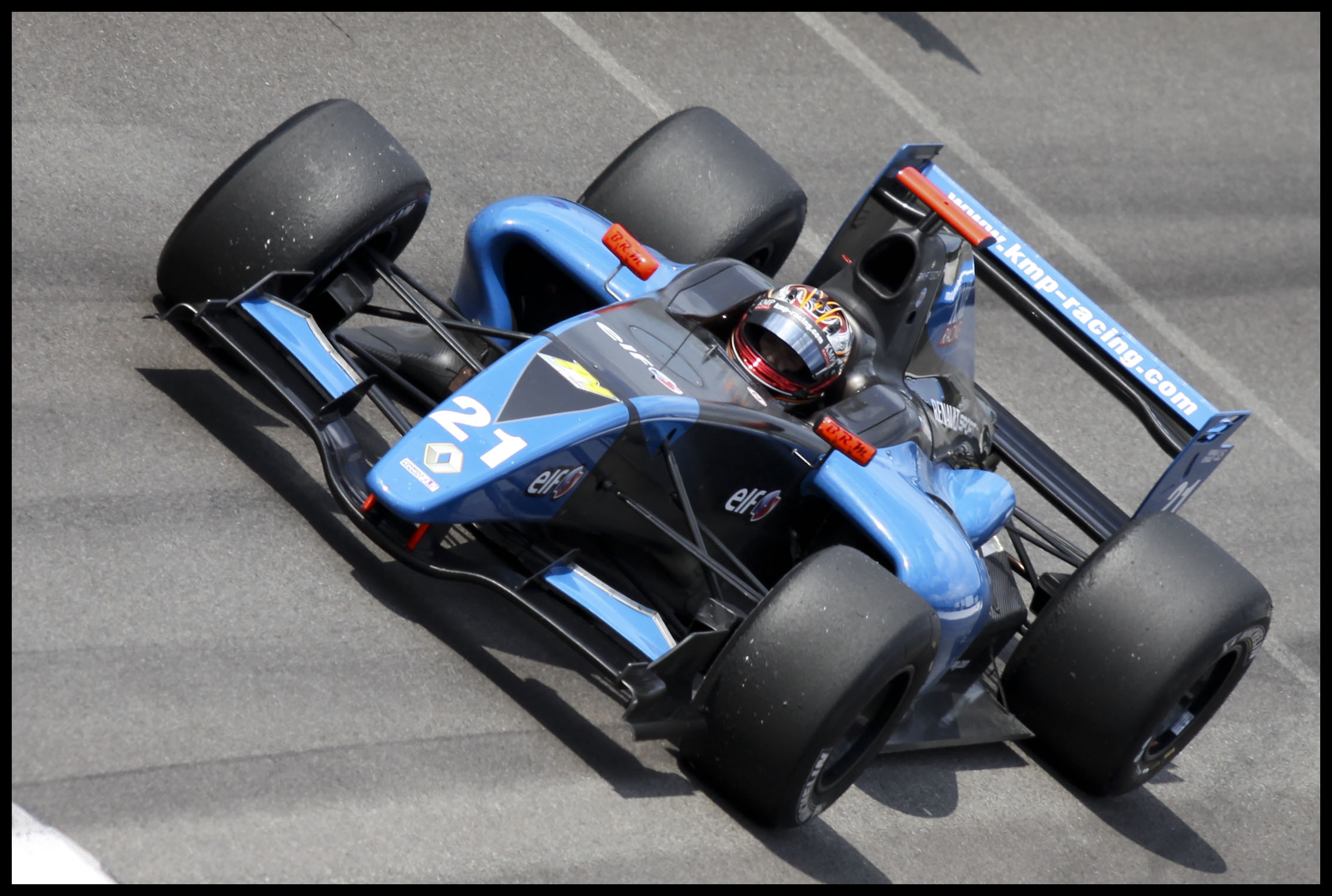 Formula Renault 3.5 Series